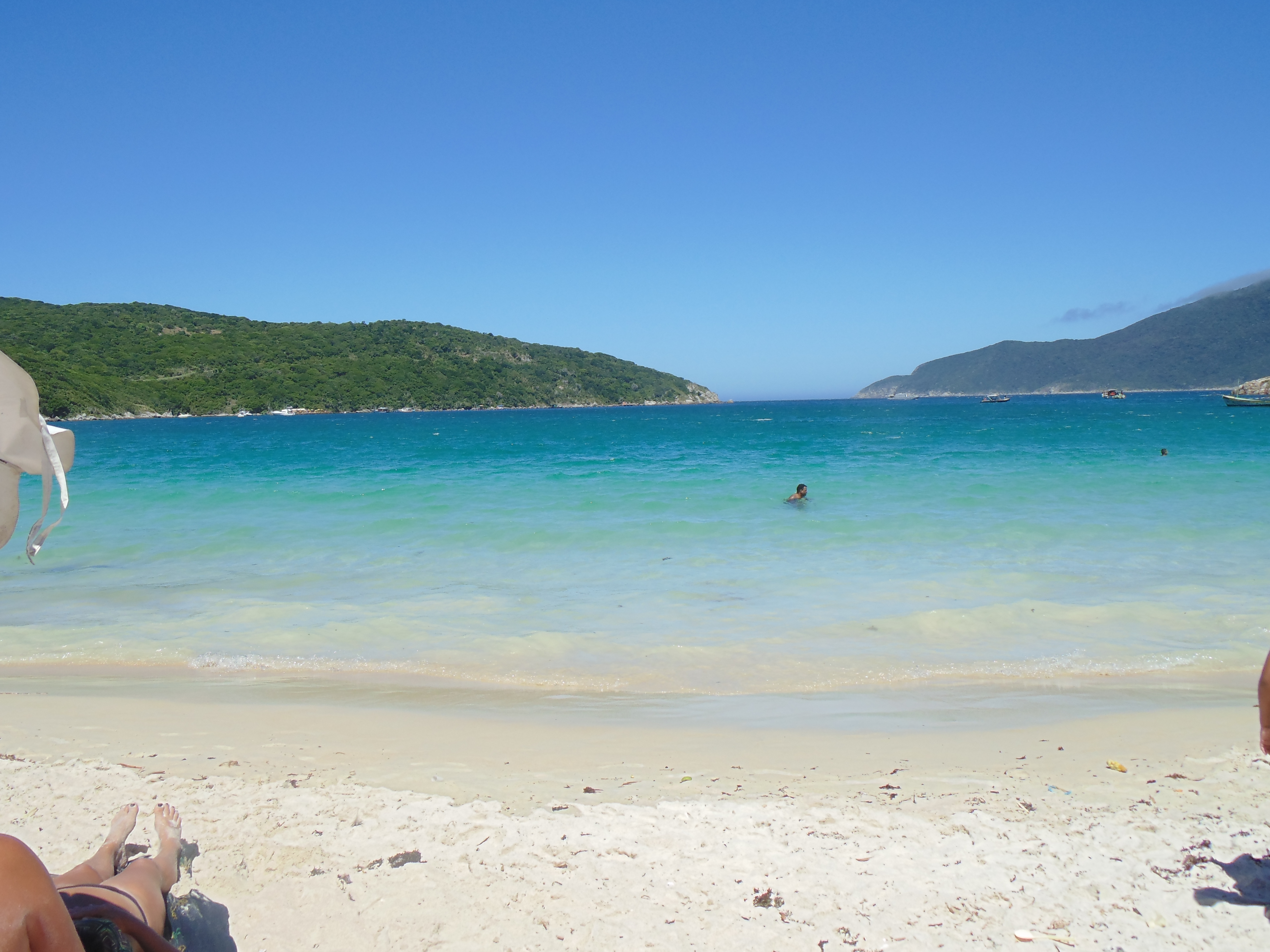 lindo